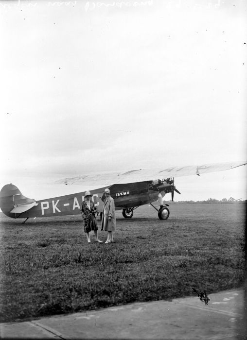 Negatief. Het vliegtuig naar Bandoeng staat gereed voor vertrek op het vliegveld Tjililitan bij Batavia